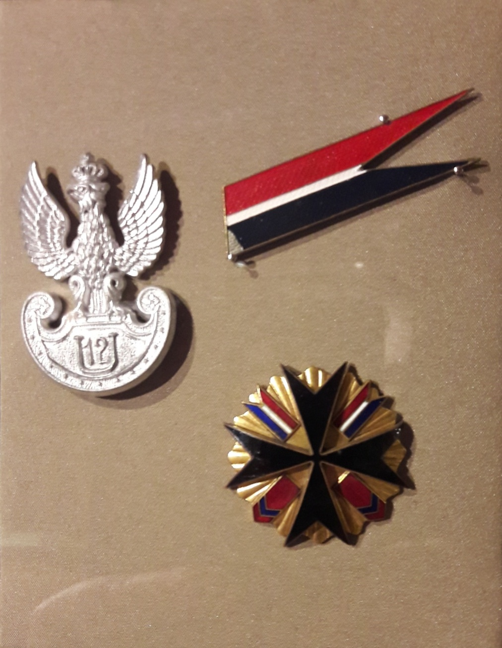 Orzeł, odznaka i proporczyk 12 Pułku Ułanów Podolskich odtworzonego w 2 Korpusie Polskim